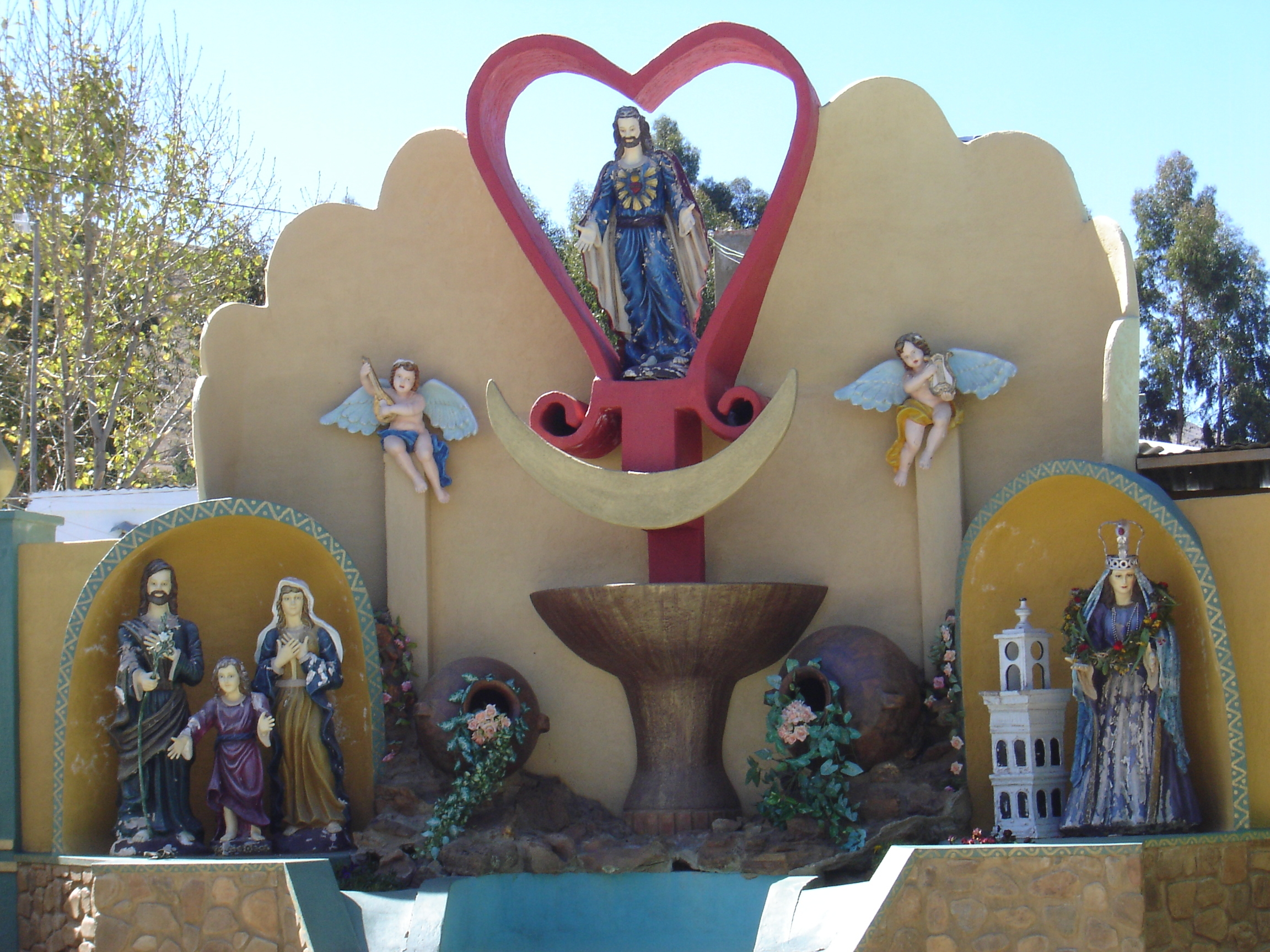 La gruta de la Guardería del Sagrado Corazón de Jesús, en la acera este de la Plaza 4 de diciembre de la población de Vacas. En la parte superior central está la imagen del Sagrado Corazón de Jesús rodeado por dos ángeles; y en la parte inferior al lado izquierdo está la imagen de la Sagrada Familia, conformado por Jesús niño, su madre la Virgen María y San José su padre adoptivo; y al lado derecho está la imagen de la Virgen Santa Bárbara, patrona de Vacas.